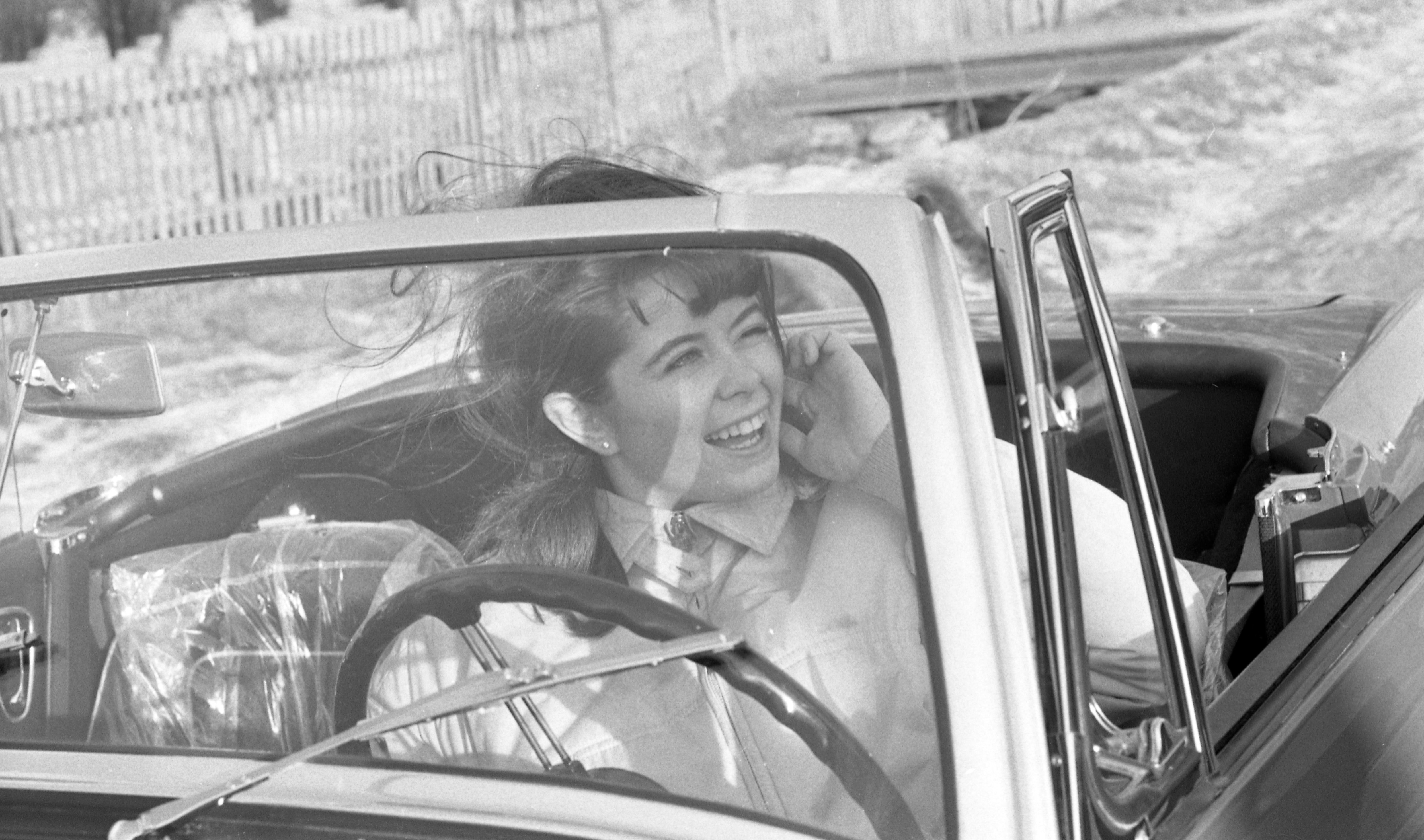 Tar førerkort og kjøper ny MG "midget", februar 1965. Foto: Lasse Klæboe. Arkivref.: PA-0797_U_3605_004_043